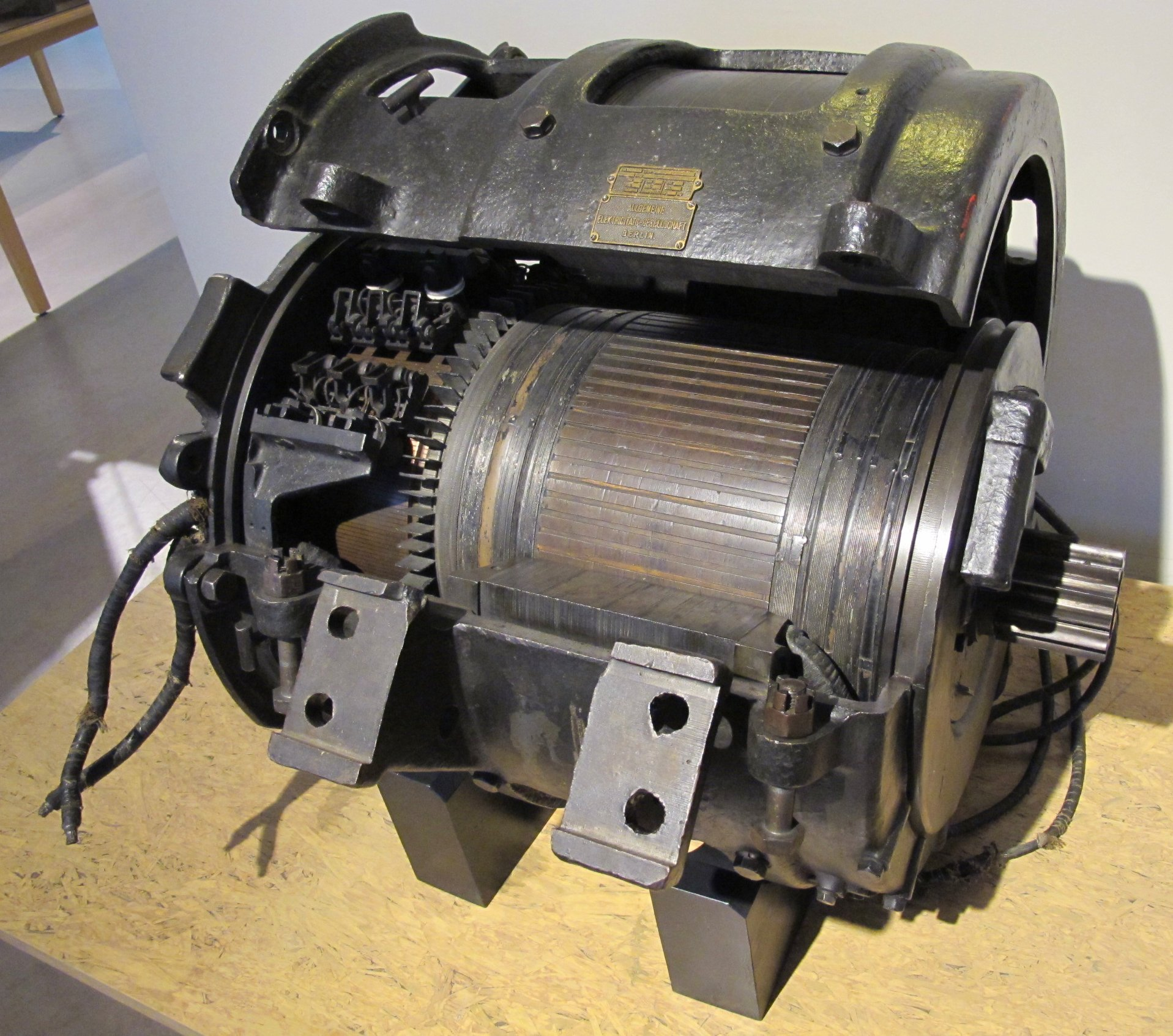 Wechselstrommotor für den elektr. Bahnbetrieb nach dem System Winter-Eichberg. Die Wiener Ingenieure Gabriel Winter und Friedrich Eichberg entwickelten zwischen 1900 und 1904 bei der AEG in Berlin erste einsatzfähige Wechselstrom-Bahnmotoren auf Basis von Reihenschlussmotoren. Dieser Motor fand auf der 1904 eröffneten Stubaitalbahn, der ersten Wechselstrombahn Europas, Verwendung. Baujahr: 1903 Hersteller: AEG, Berlin Leistung: 29,4 kW (40 PS) Spannung: 595 Volt Netzfrequenz: 42 Hertz